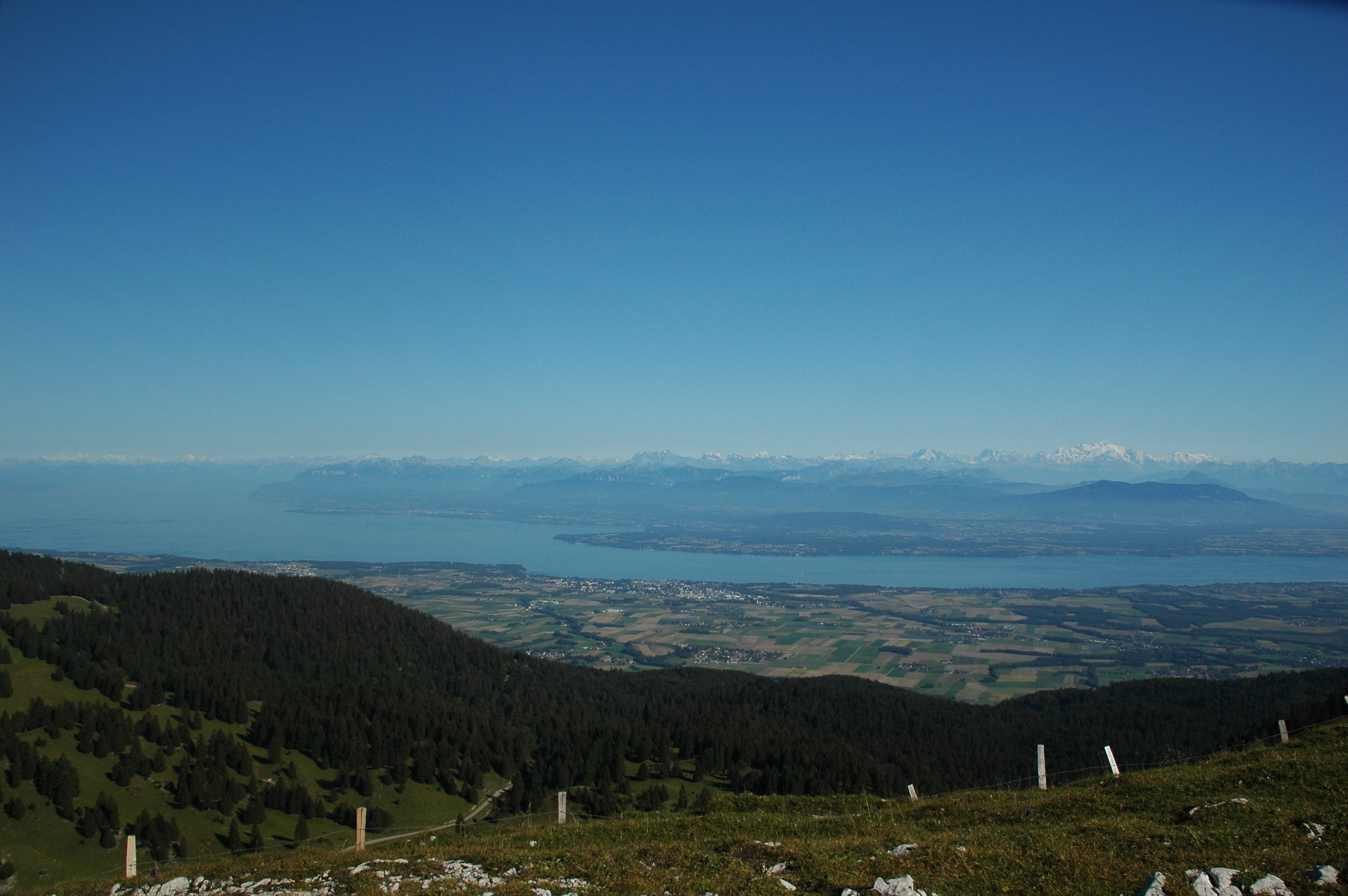 vue du basin lémanique depuis La Dôle